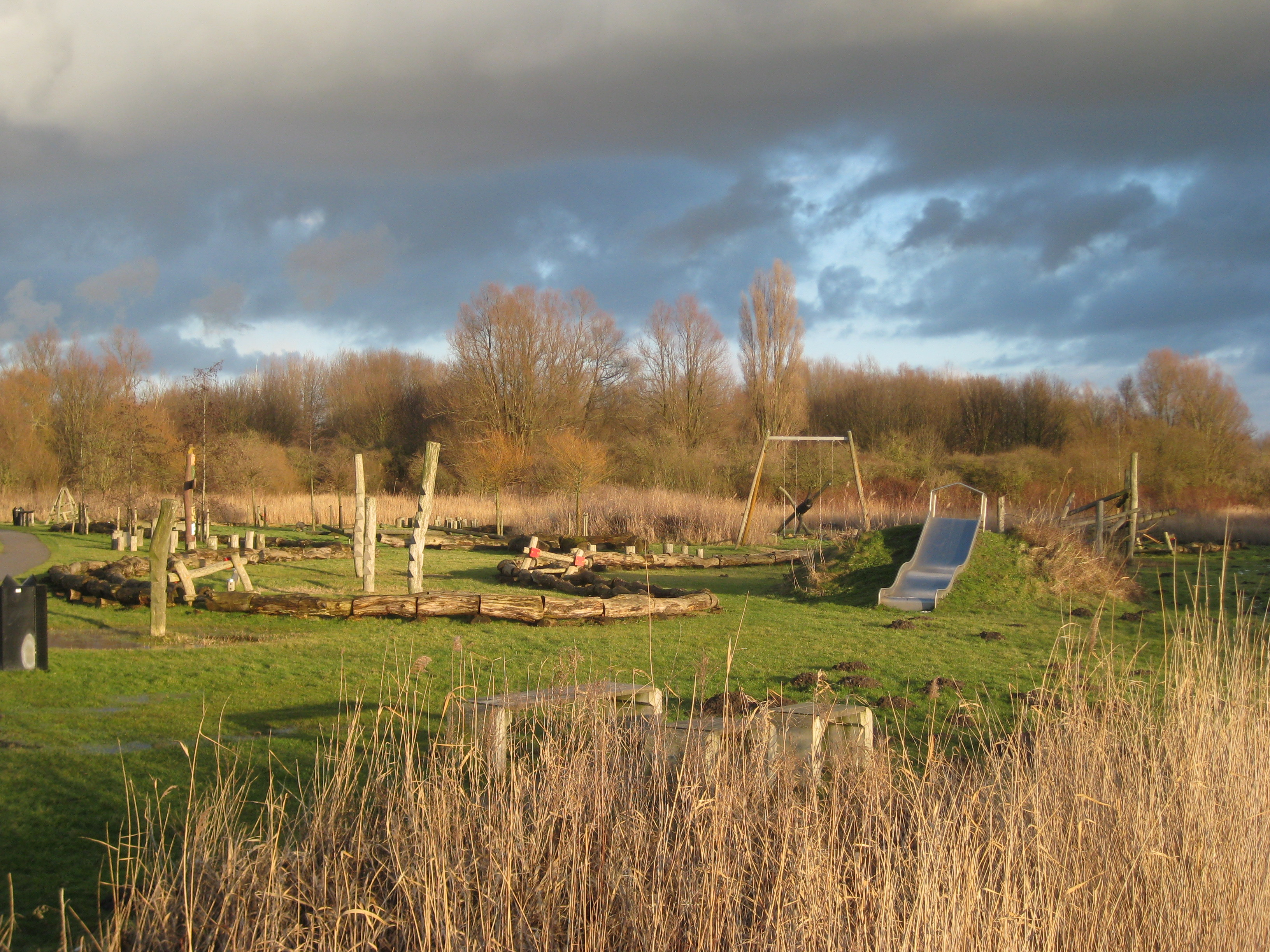 Cultuurpark De Lange Bretten in Amsterdam-West